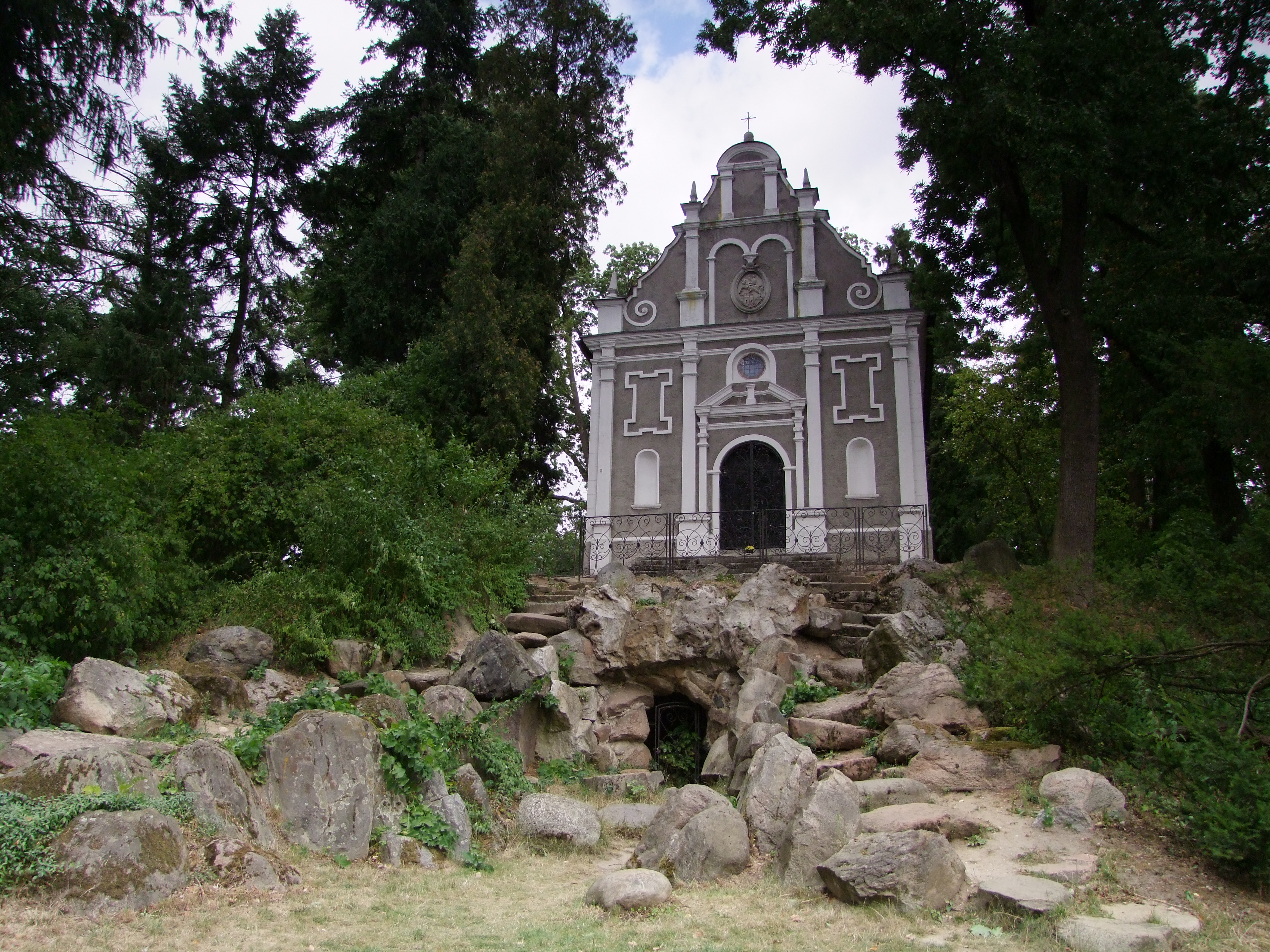 zespół zamkowy: mauzoleum Izabelli Działyńskiej z 1892 r. Gołuchów, Gołuchów